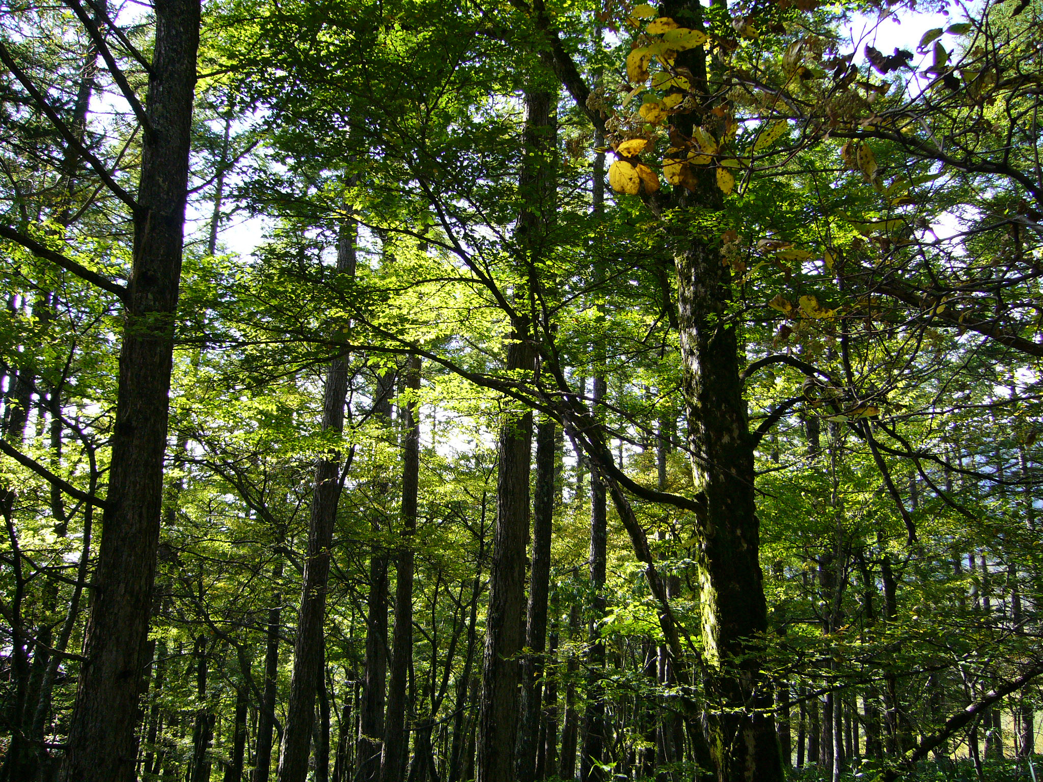 Kamikochi, Matsumoto, Nagano